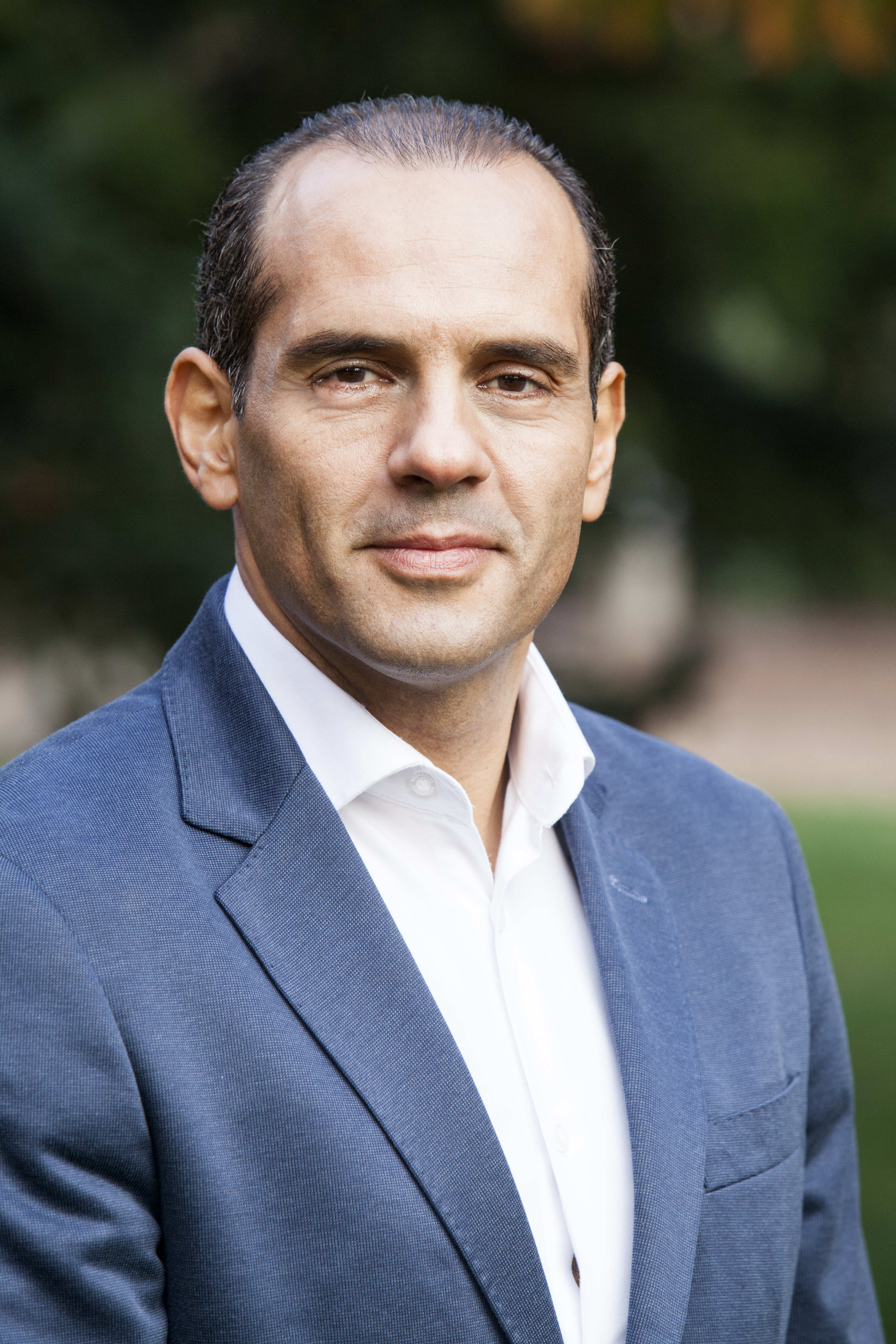 Juan Verde en Madrid